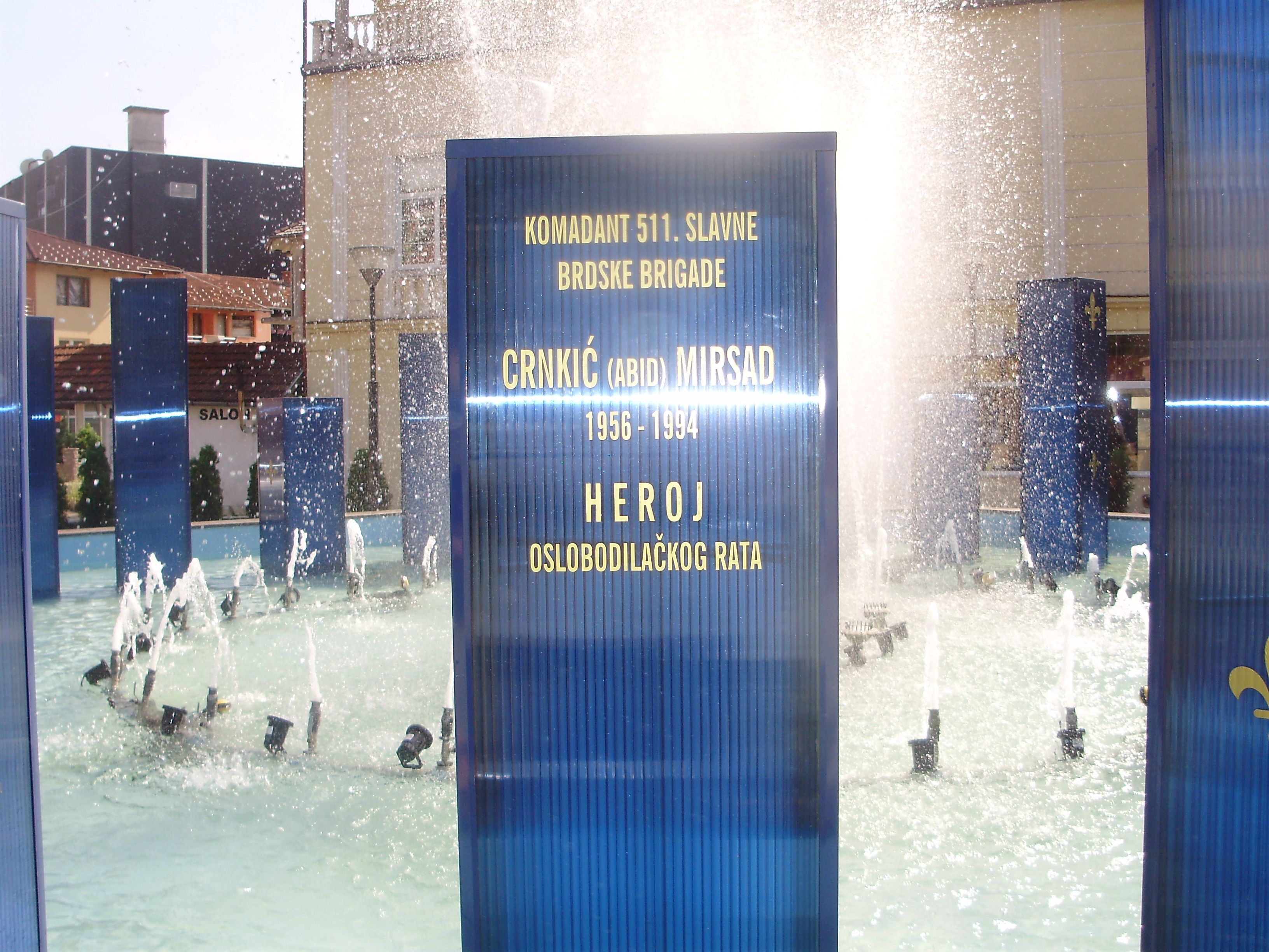 Spomenik šehidima u Bosanskoj Krupi.